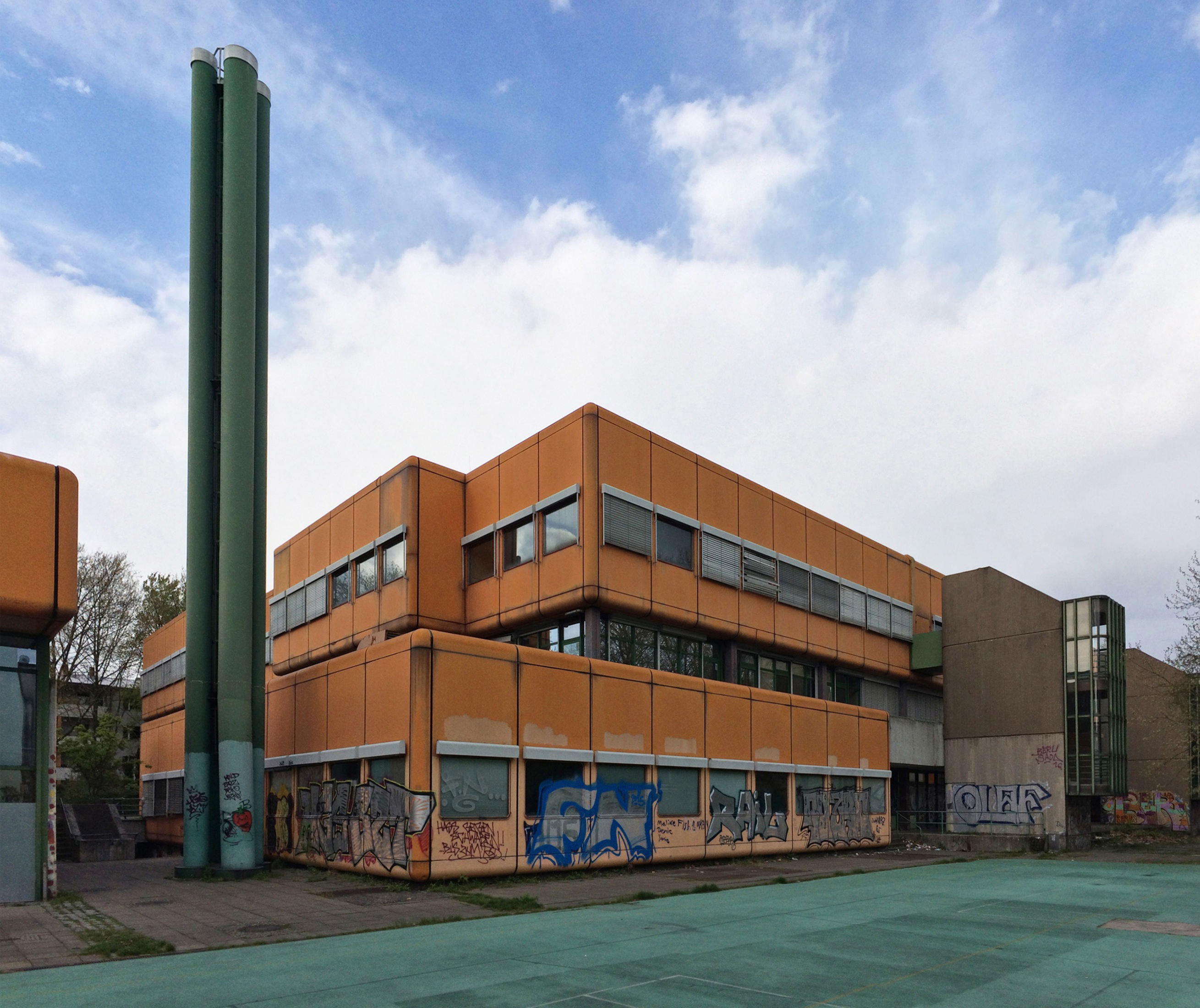 Ehemaliges Diesterweg-Gymnasium, Gebäude leerstehend seit 2011; Pysall, Jensen, Stahrenberg & Partner (Hans-Joachim Pysall, Uwe Jensen, Peter Stahrenberg, Joachim Grundei, Hans Hergeth, Holger Purwing), 1974–1977, Sanierungsgebiet Brunnenstraße, Berlin-Wedding, städtebaulicher Entwurf 1963–1966, Fritz Eggeling